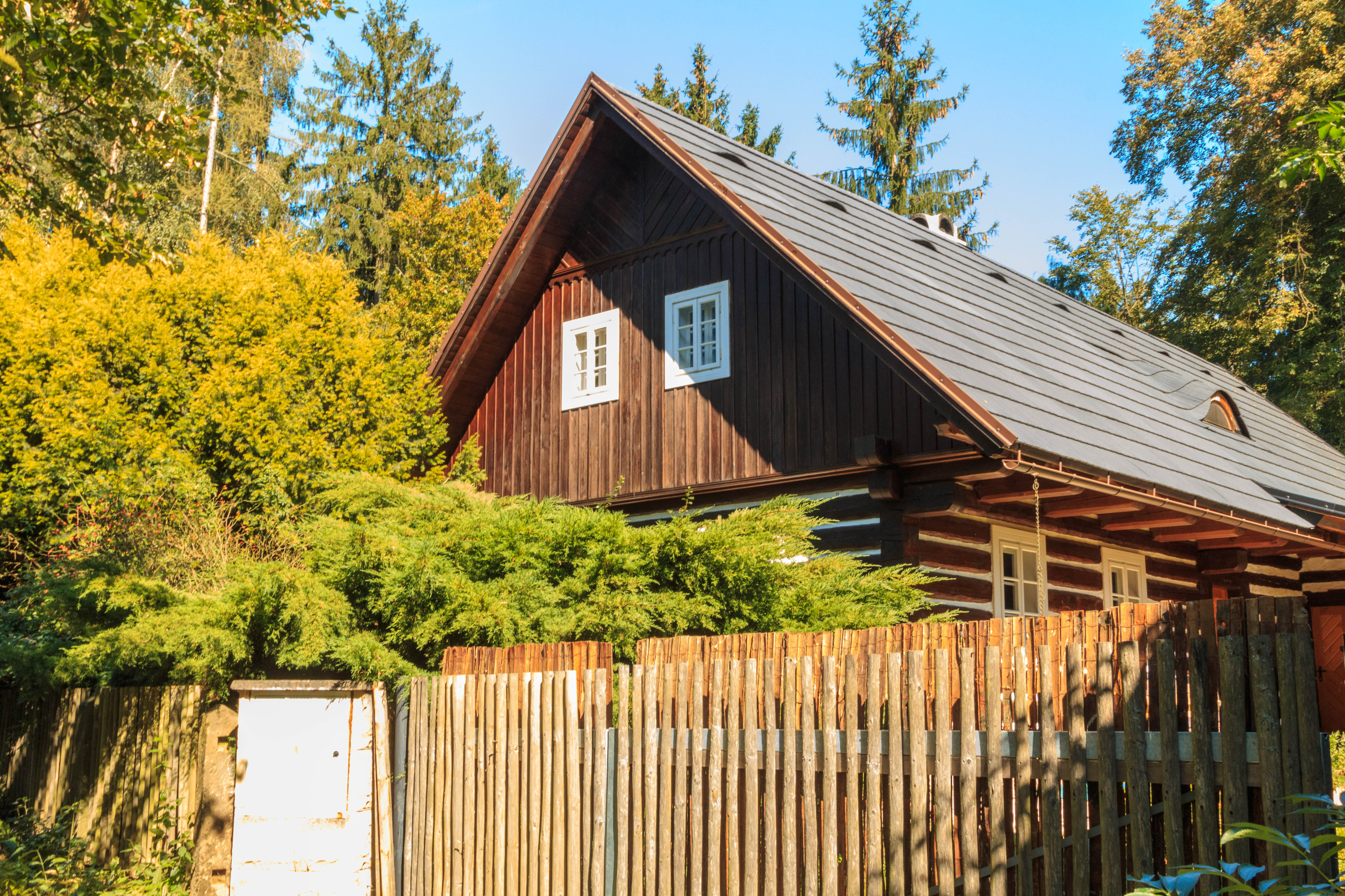 Želejov u Hrubé Skály - čp. 2